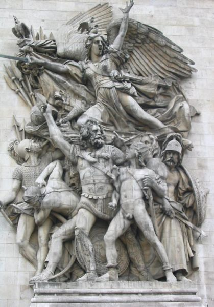 Le Départ des volontaires de 1792, aussi appelé La Marseillaise, œuvre de François Rude sur l'Arc de triomphe de l'Étoile, Paris.